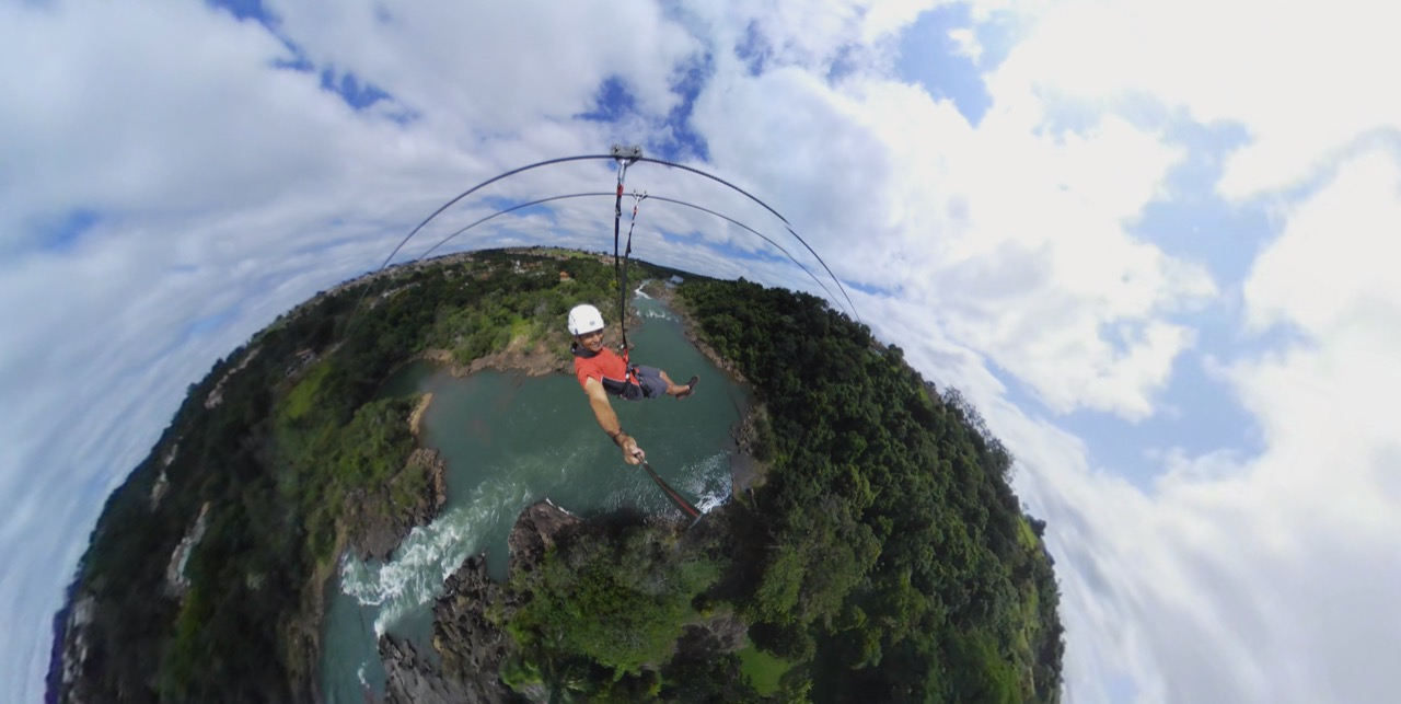 tirolesa Piraju